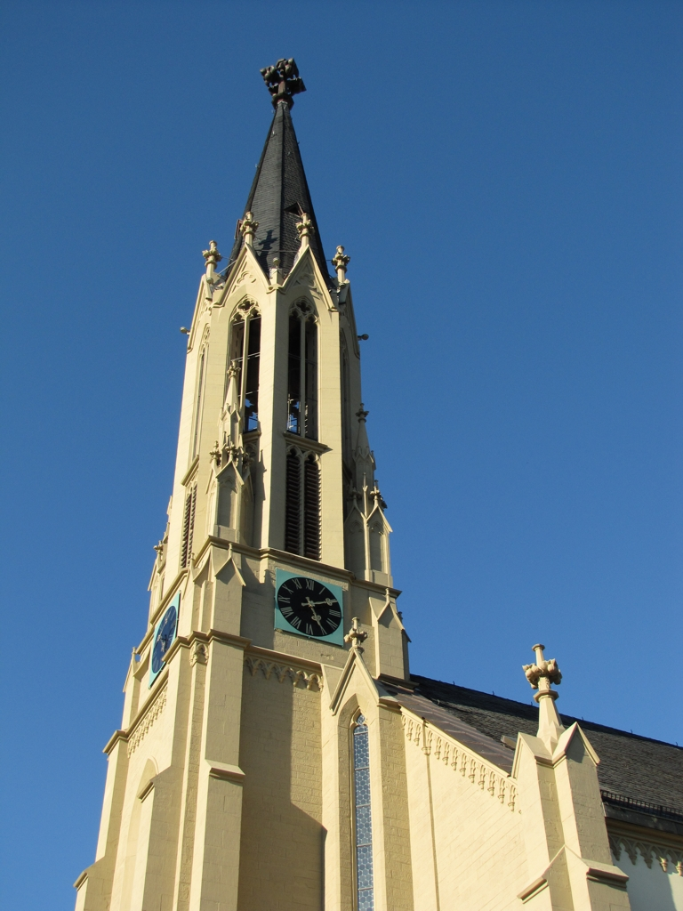 Evangelische Stadtkirche Walldorf